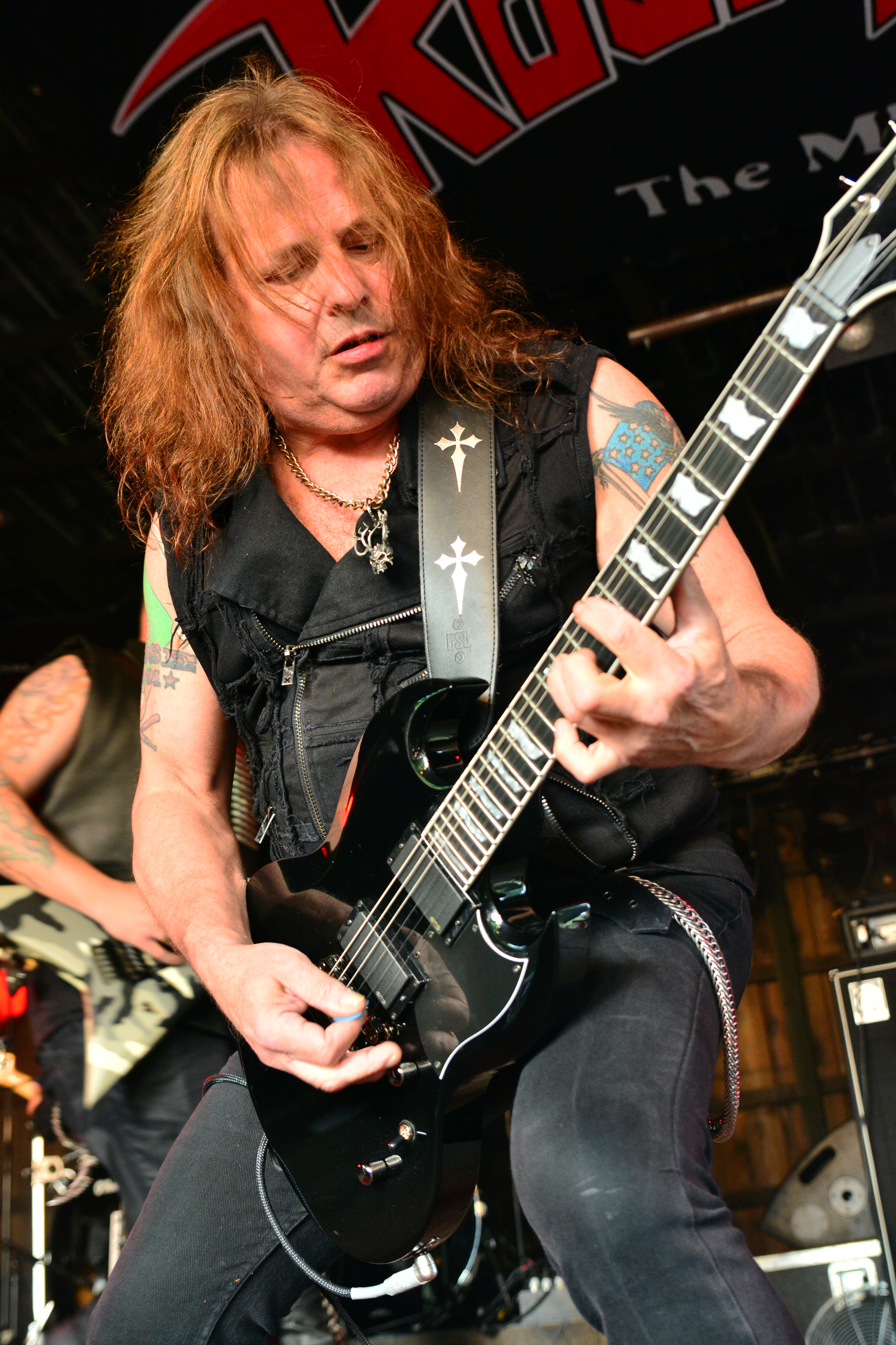 Death Dealer beim Headbangers Open Air 2015